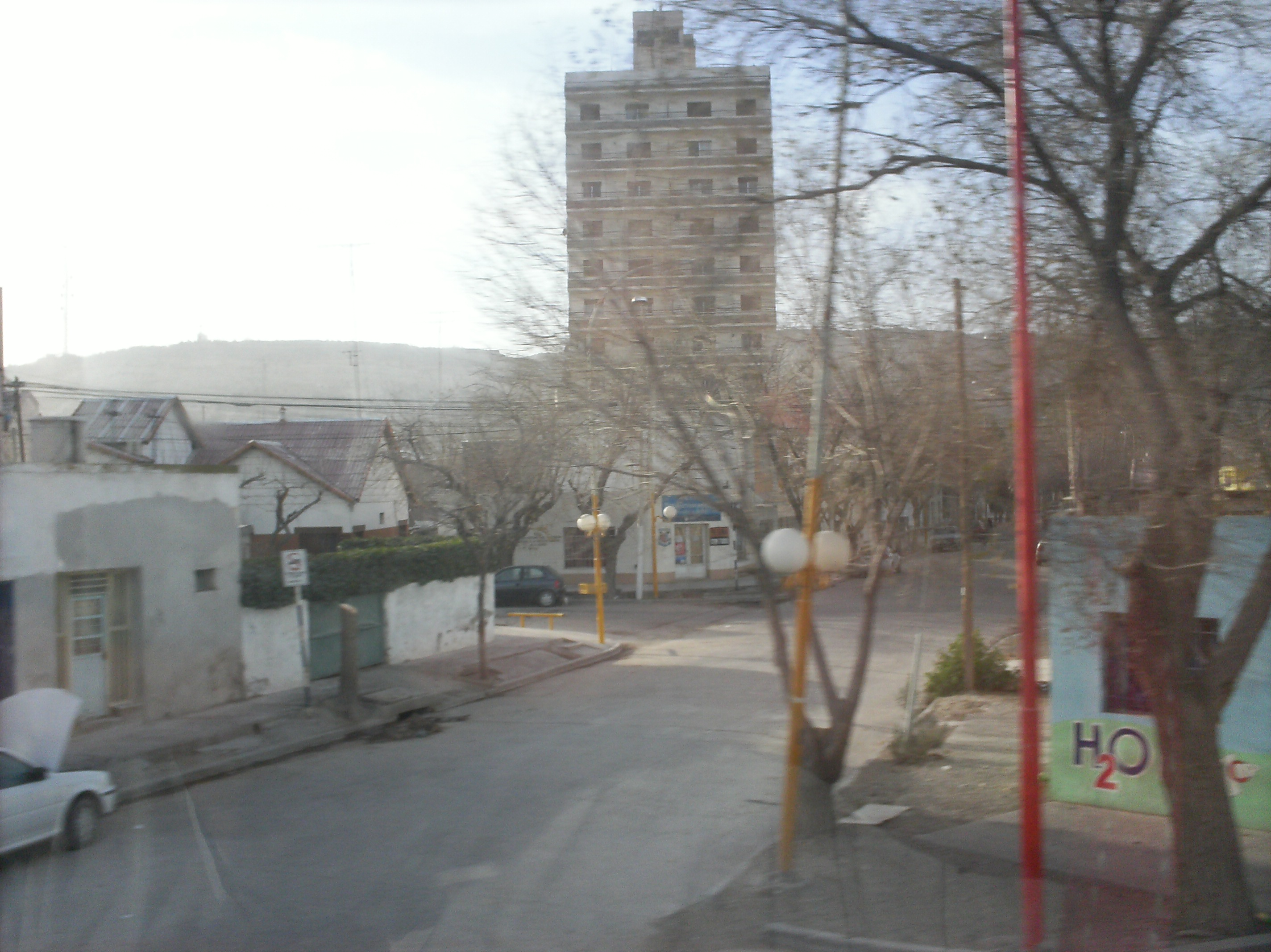 Calle Ing. Bonoli, Villa Regina. Detrás, el edificio Italia 275, la torre más alta de la ciudad.